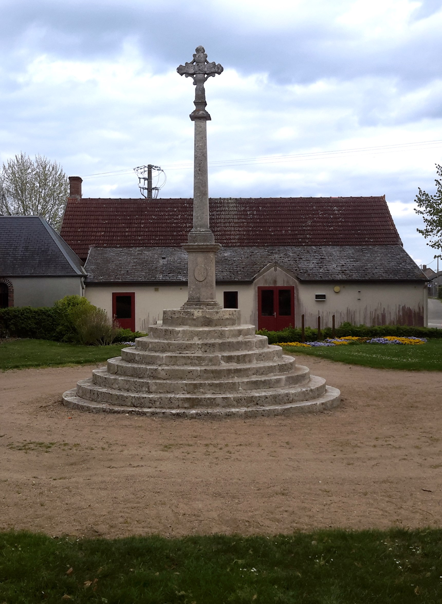 Calvaire, place de l'église, Chapelon, Loiret, France.